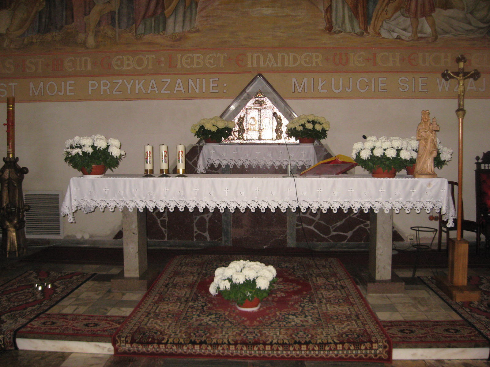 Ołtarz główny